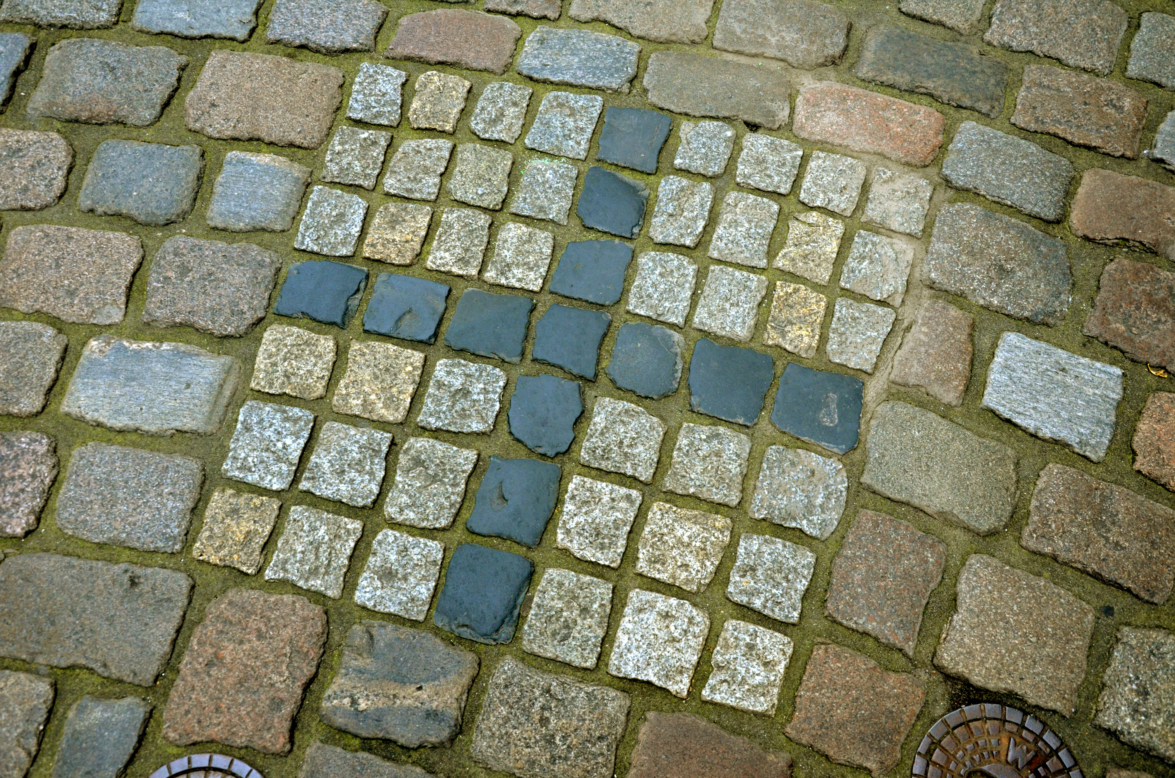 Das Kreuz im Pflaster schräg vor dem Hauptportal der Marktkirche in Hannover markiert den sogenannten Vierkirchenblick, von dem aus der Besucher auch die drei weiteren Kirchtürme der Aegidienkirche, der Kreuzkirche und der Neustädter Kirche erblicken kann ...